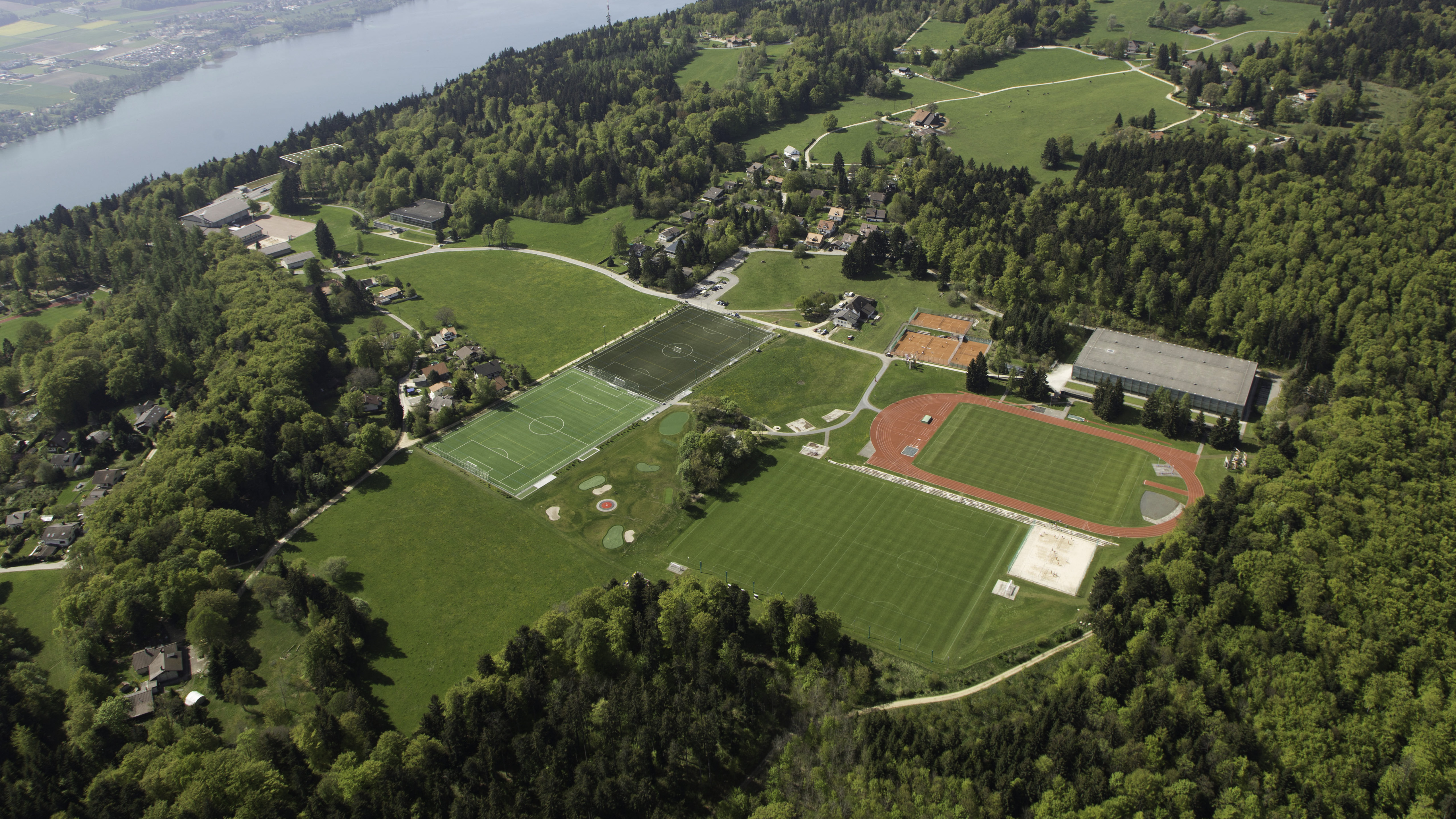 Sportanlagen in Magglingen am Bundesamt für Sport BASPO in einer Luftaufnahme.